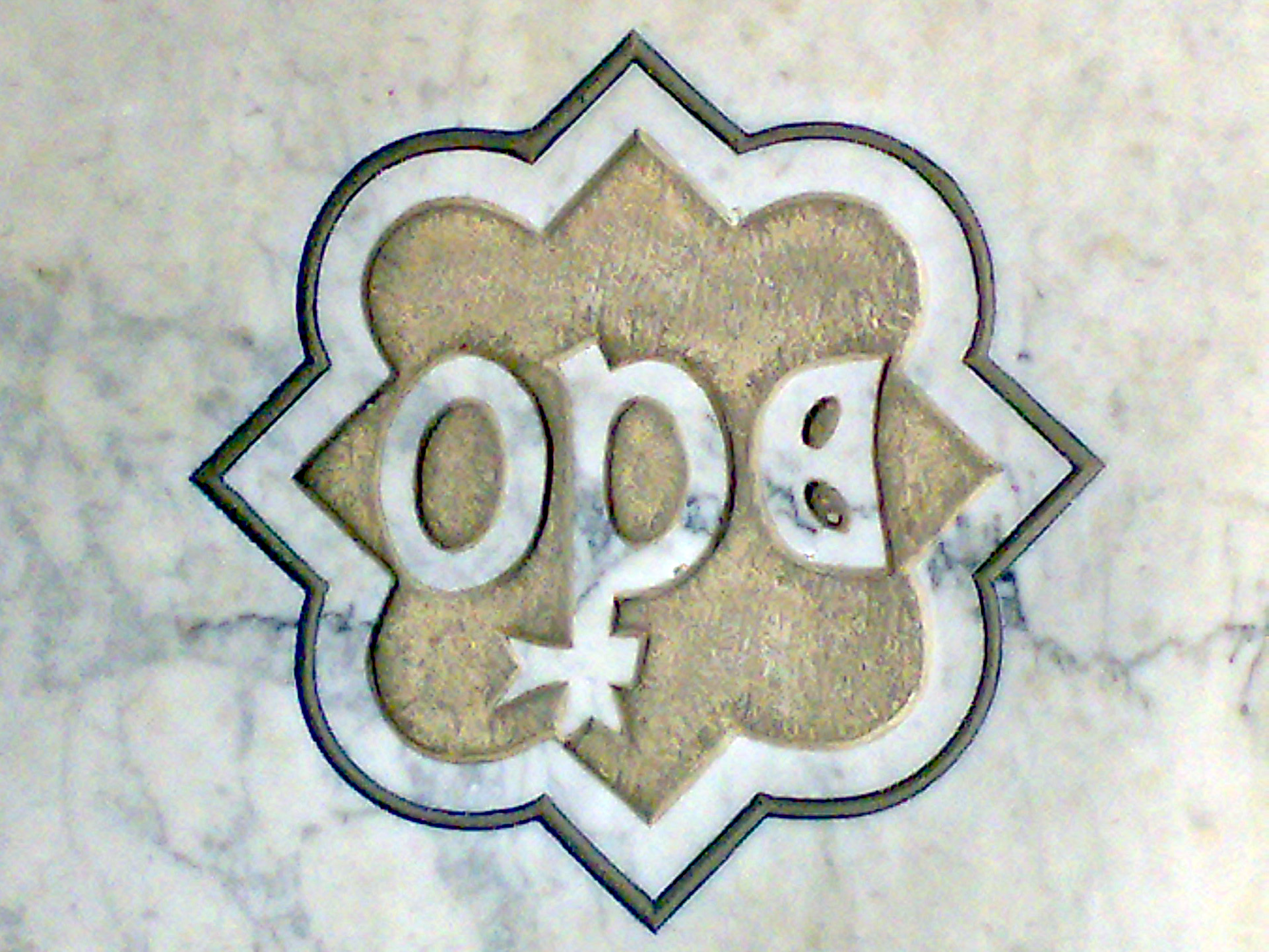 Simbolo dell'Opera del Duomo di Pisa. E' la parola "Operae" scritta con abbreviazioni latine.